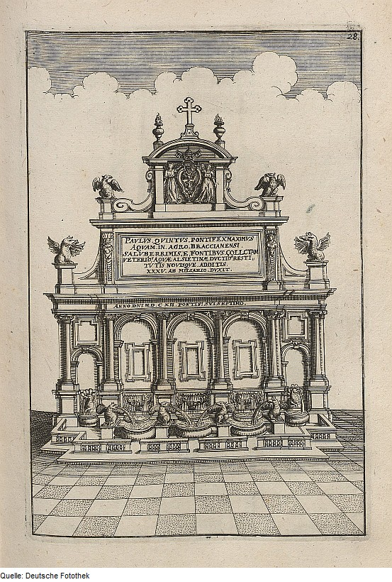 Original image description from the Deutsche Fotothek Architektur & Mechanik & Wasserförderung & Wasserkunst & Springbrunnen